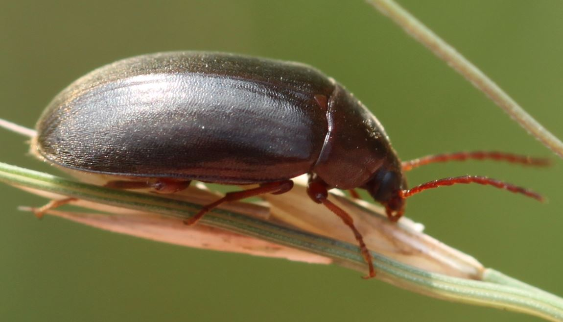 Käfer Hymenalia rufipes am 7. Juni 2018 in der Schwetzinger Hardt